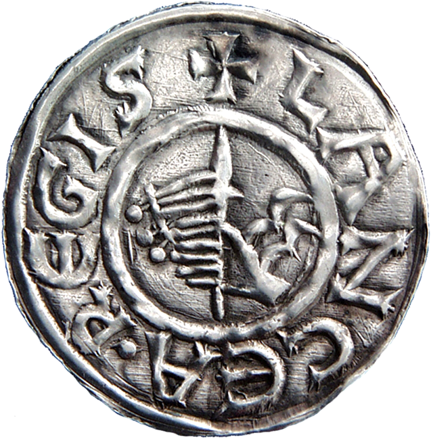 A középkori magyar pénzverés egyik legszebb emléke, a feltételezések szerint az első magyar király, Szent István által veretett Lancea Regis feliratú ezüstdénár